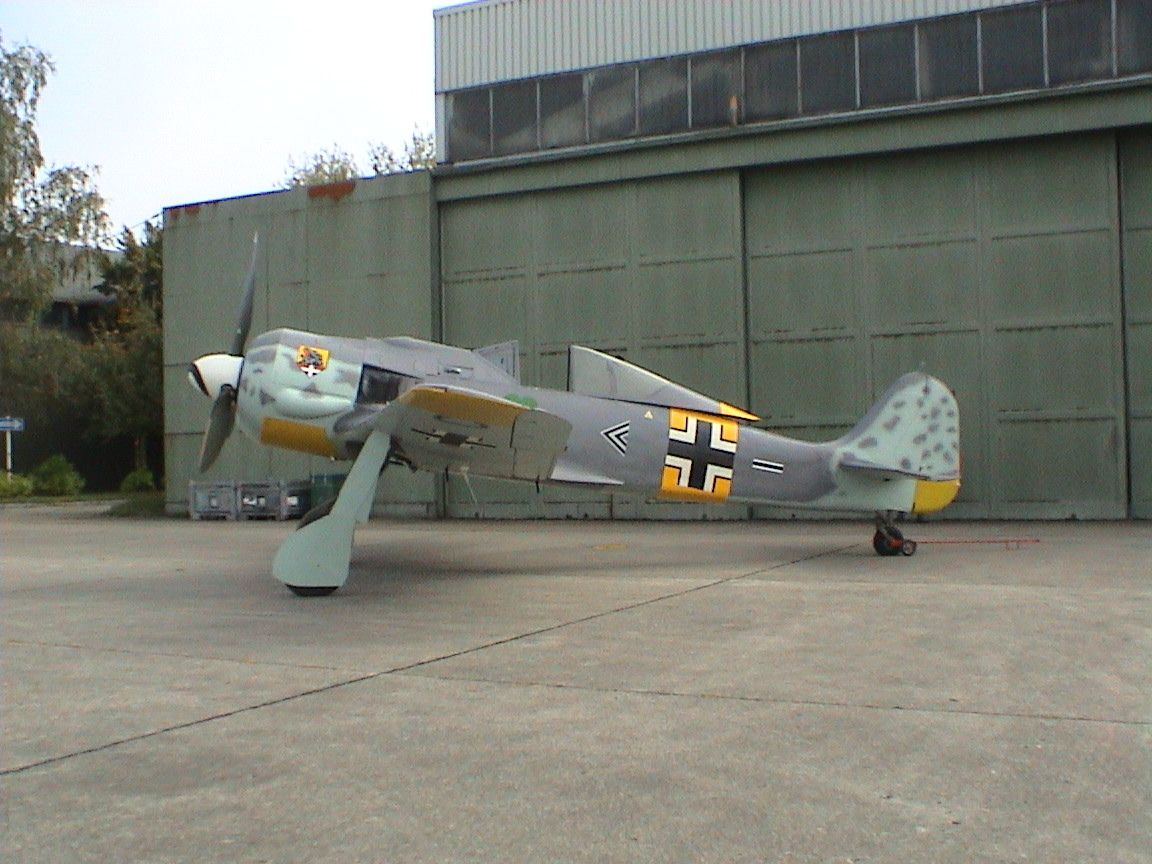 Flug Werk Fw190 A6 im Farbschema von Erich Rudorffer 1944 in Finnland, umlackiert für den Film Tali-Ihantala 1944